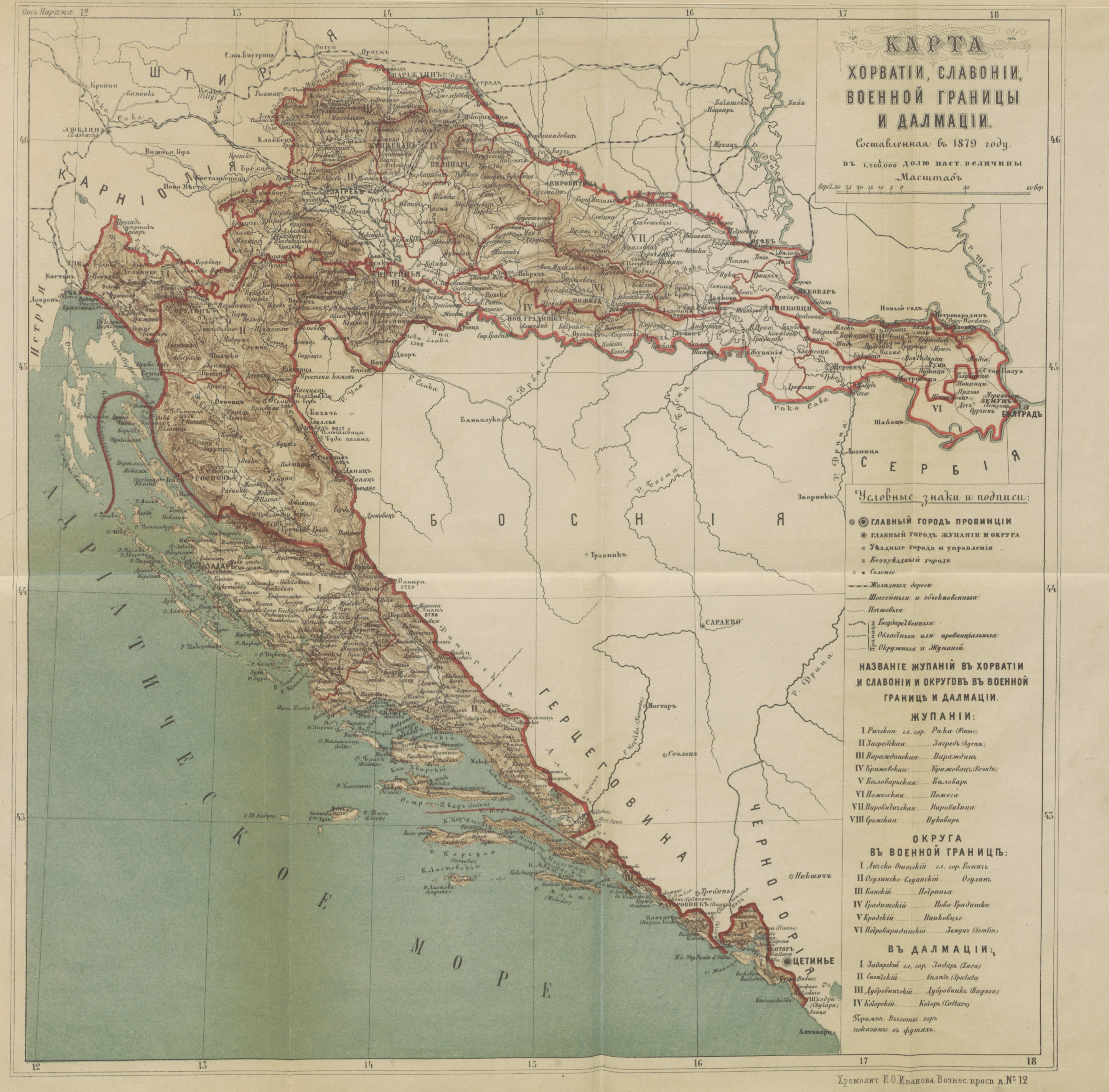 Хорватія, Славонія, Далмація и Военная Граница